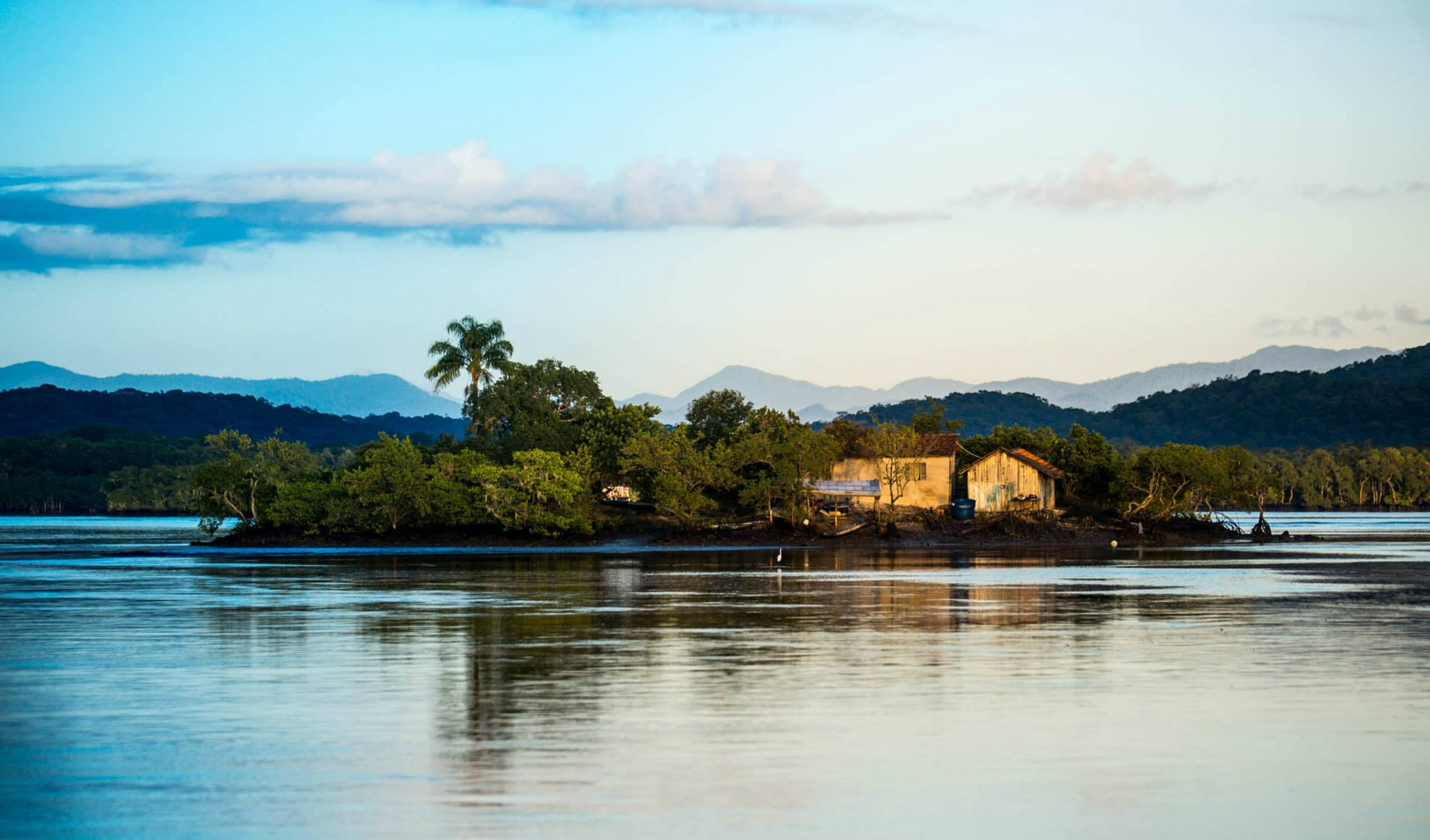 Paisagem da travessia de Cananéia à Ilha do Cardoso